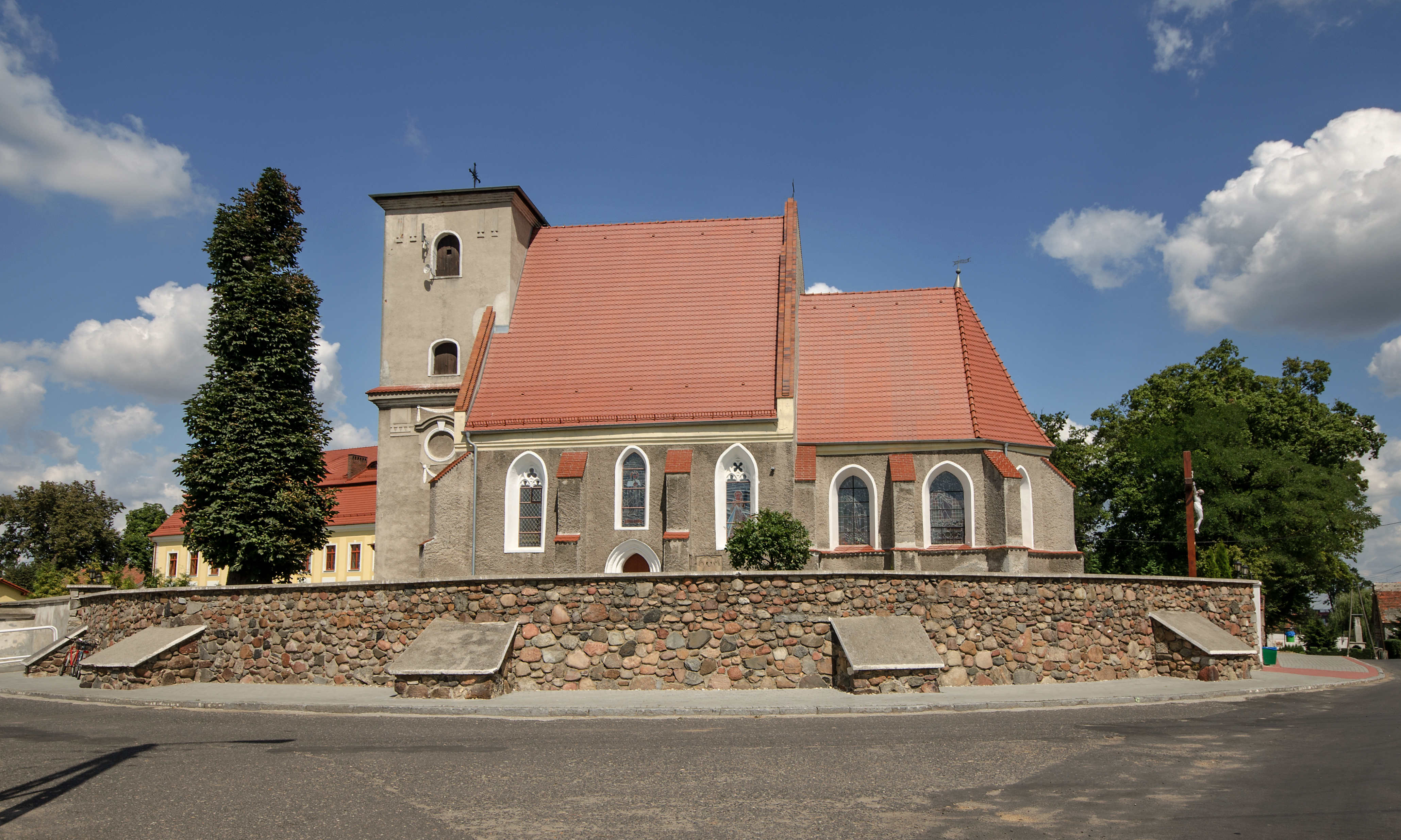 Zwanowice, zespół kościoła fil. pw. Matki Boskiej Królowej Polski